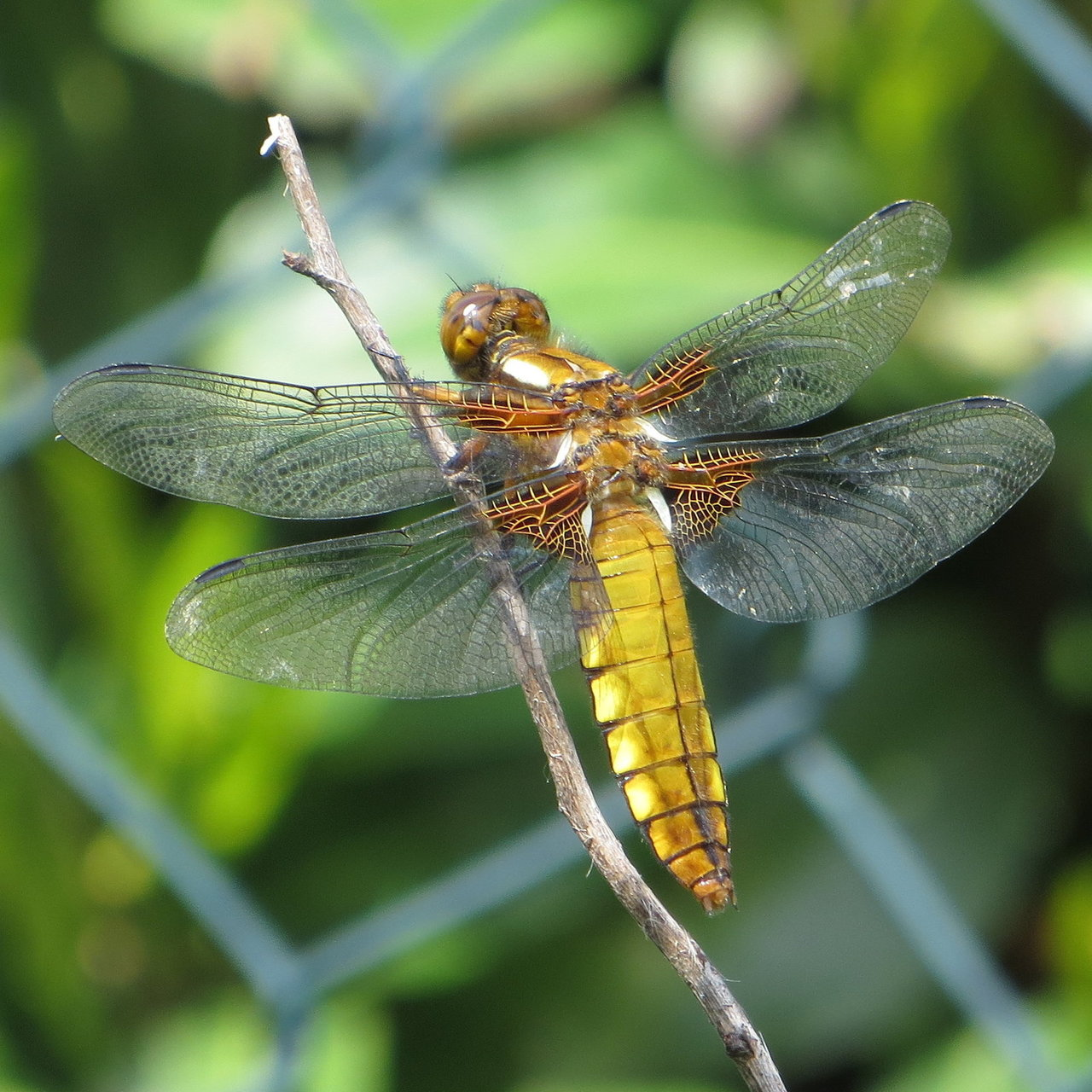 Libellula depressa (female).